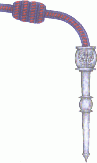 Krzyż Kawalerski Orderu Krzyża Wojskowego. Sznur orderowy.